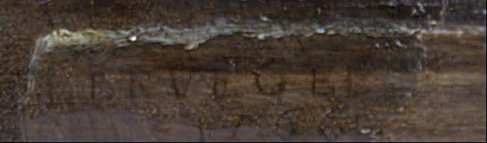 Signatur des Gemäldes Die Volkszählung zu Bethlehem (rechte untere Ecke)